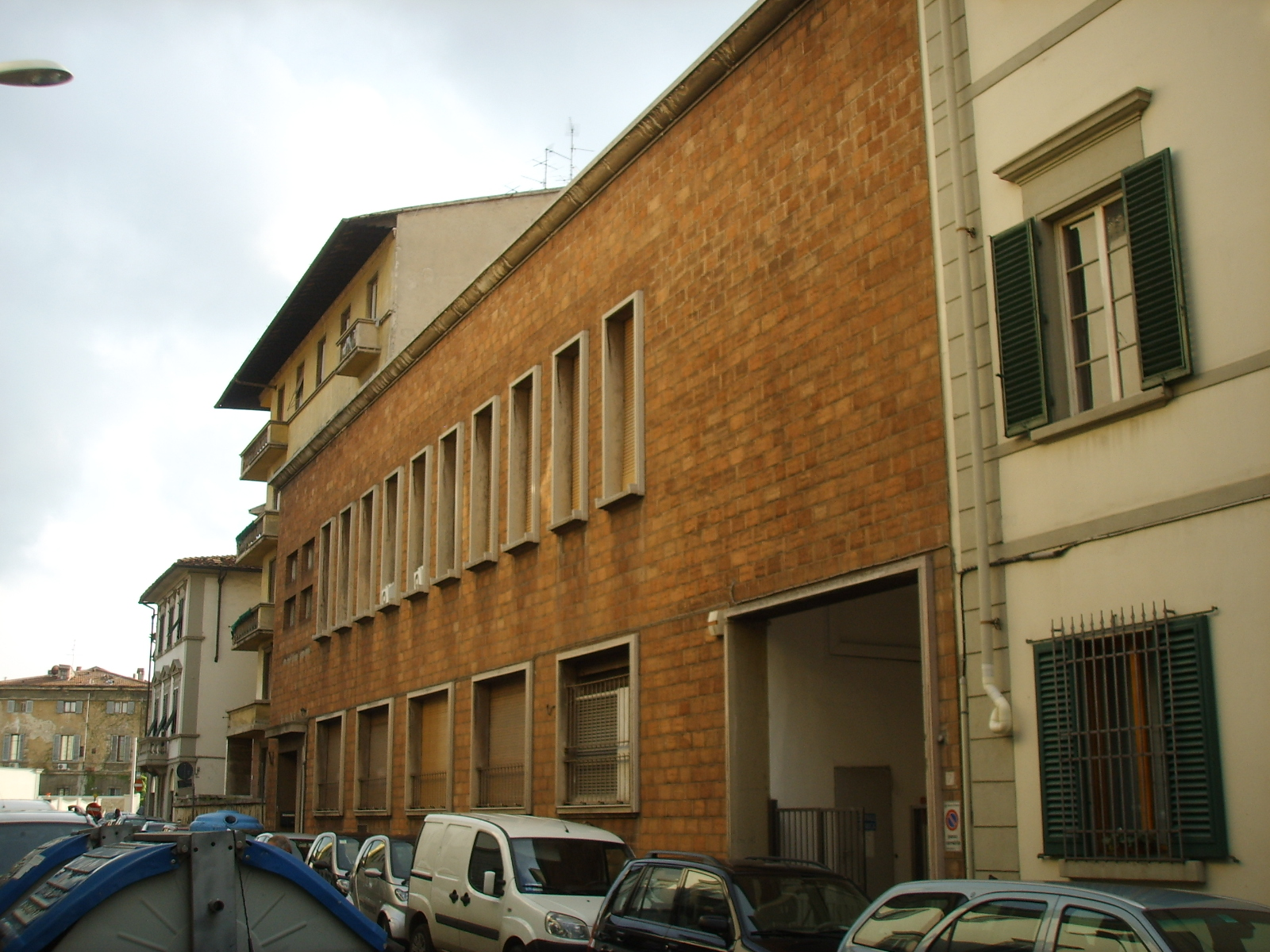 Ex sede singer, emeroteca università